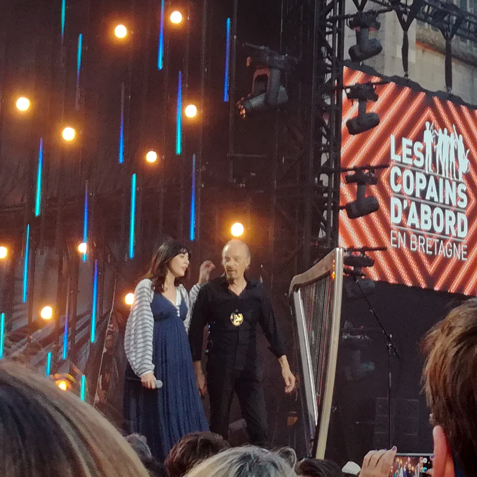 Alan Stivell et Nolwenn Leroy lors du tournage de l'émission Les Copains d'abord en Bretagne, place Saint-Corentin à Quimper.